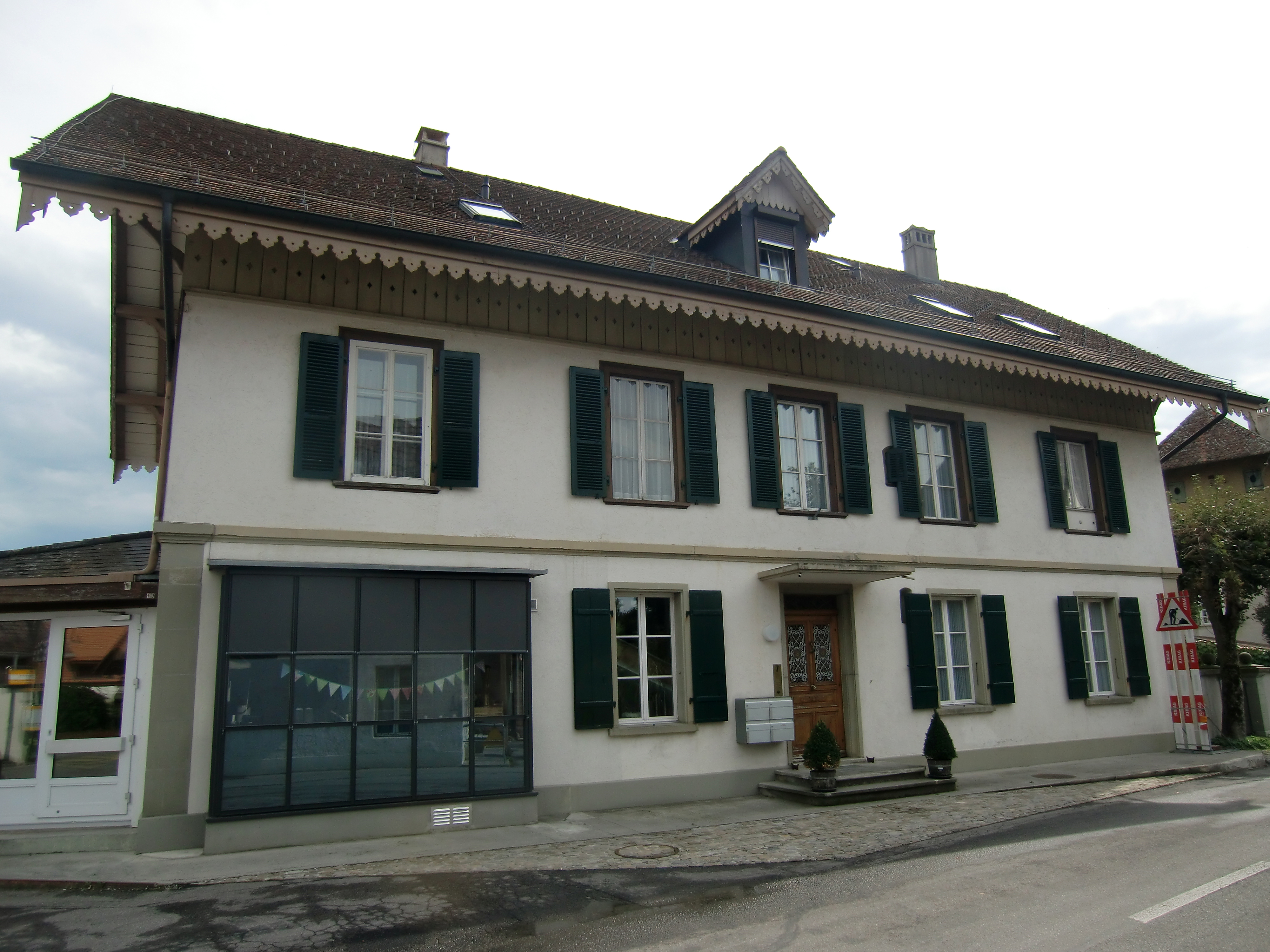 Villa der ehemaligen Pension Beau Séjour in Zimmerwald. Schauplatz der Zimmerwalder Konferenz